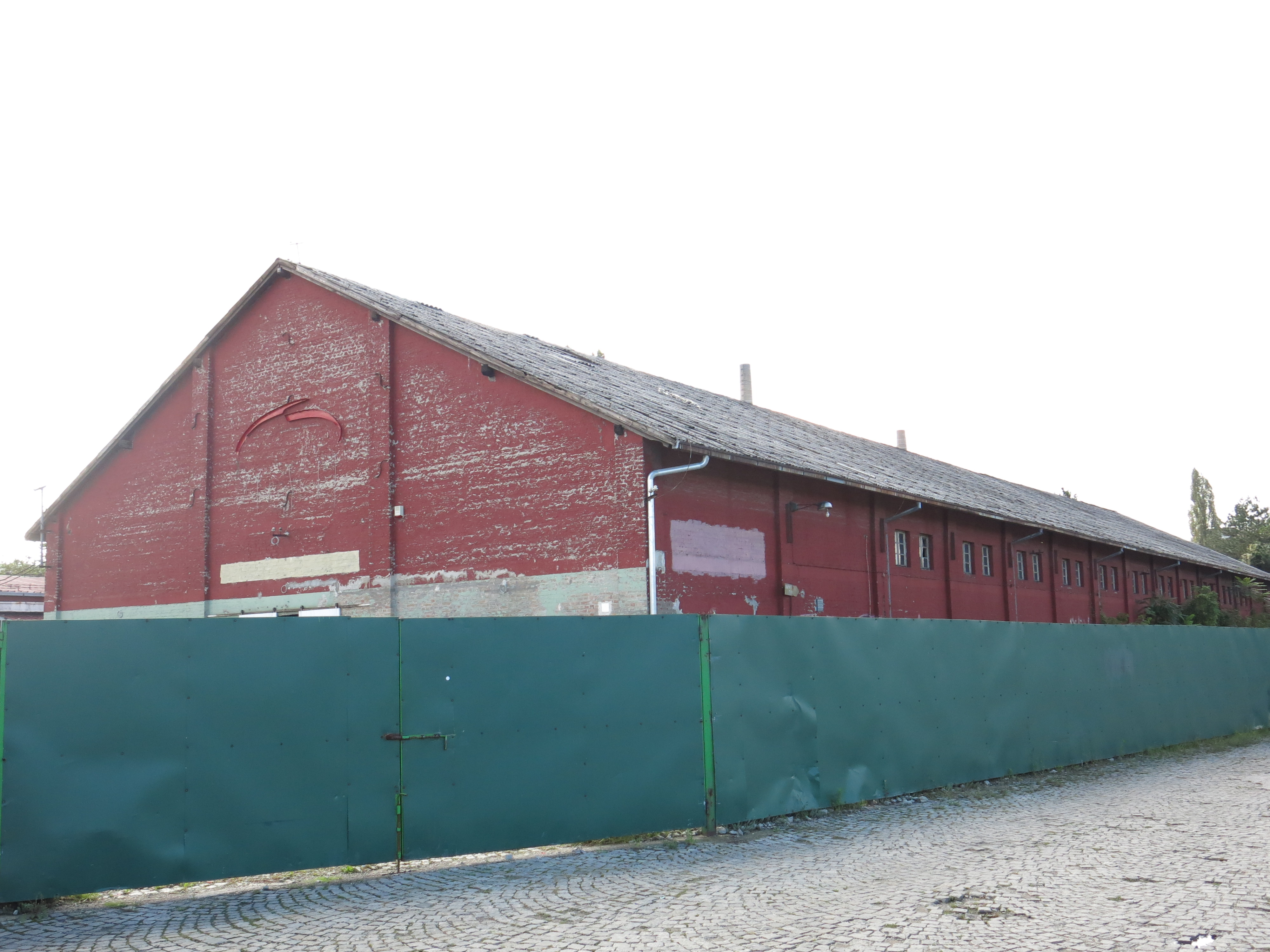 Фабрика шећера